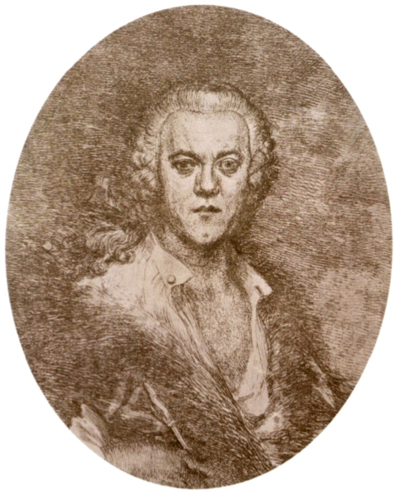 Selbstporträt von Martin Johann Schmidt, genannt Kremser Schmidt